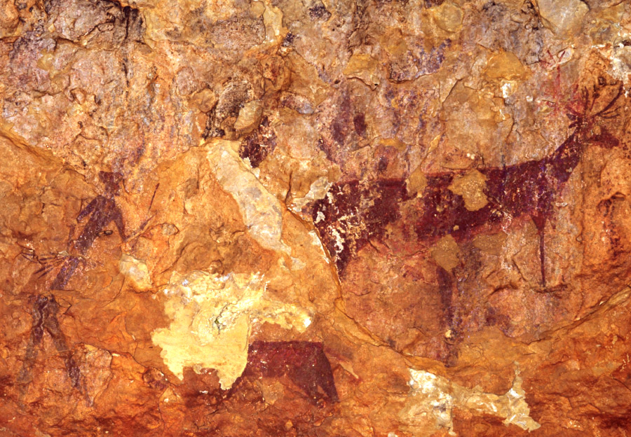 Abrigos de tortosilla (Ayuntamiento de Ayora)